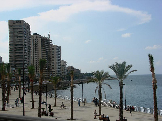 La passeggiata lungo il mare di Beirut e' sempre piacevole,ora i lavori di manutenzione e rifacimento sono quasi terminati . E' stata rimessa a nuovo: marciapiede, ringhiera,lampioni, panchine, vasi di fiori, palme, palazzi, ristoranti, tutto o quasi viene restaurato e il risultato e' decisamente buono